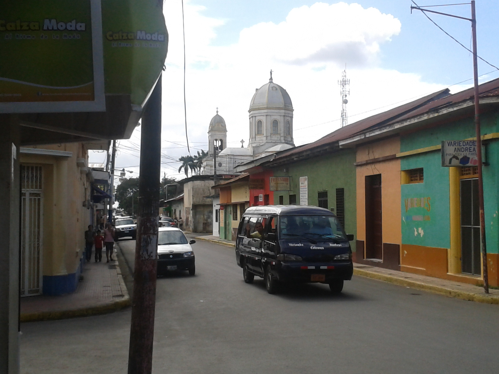 Der Kern von Diriamba mit der Kathedrale im Hintergrund